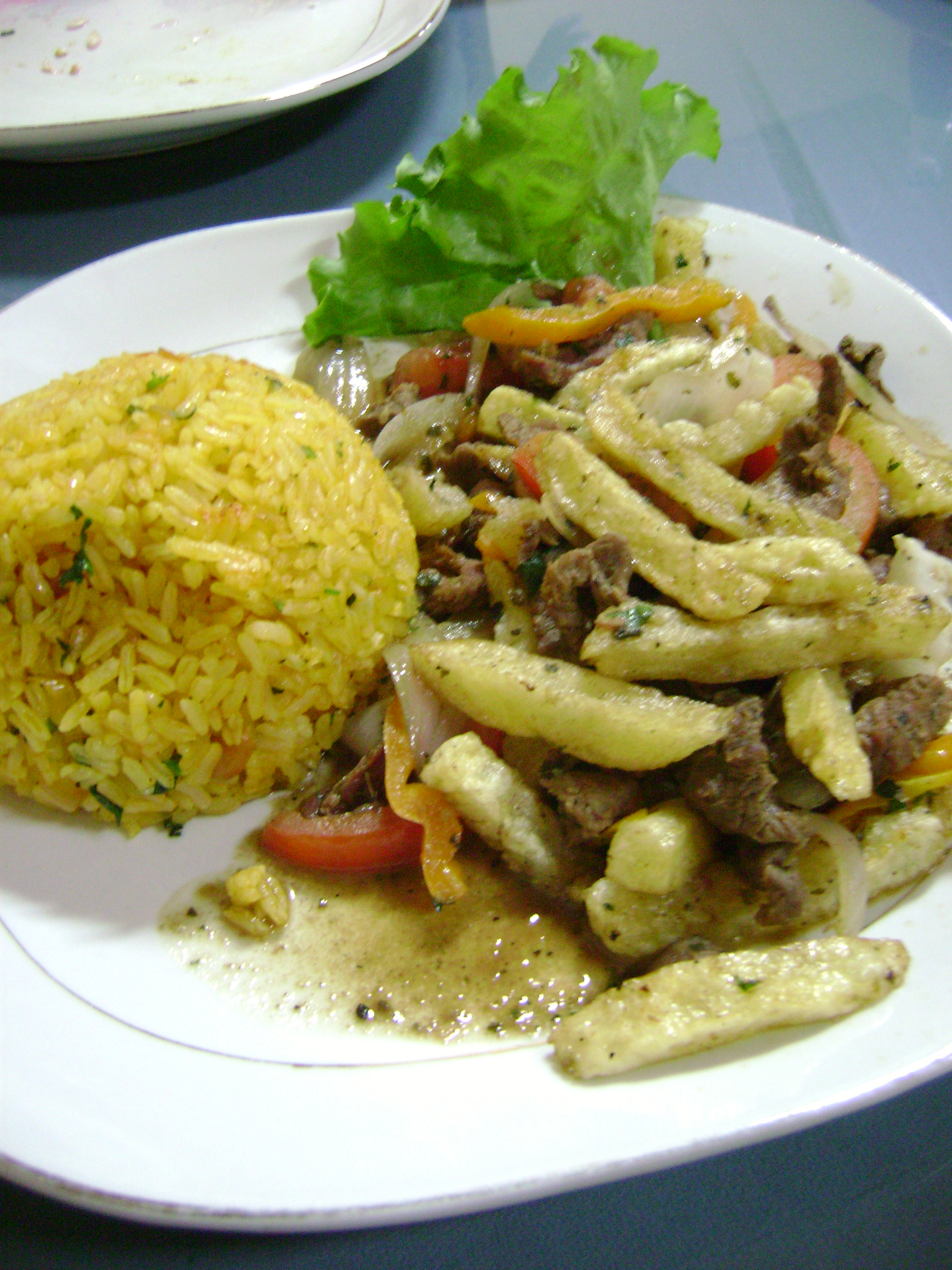 Lomo saltado acompañado de arroz amarillo.